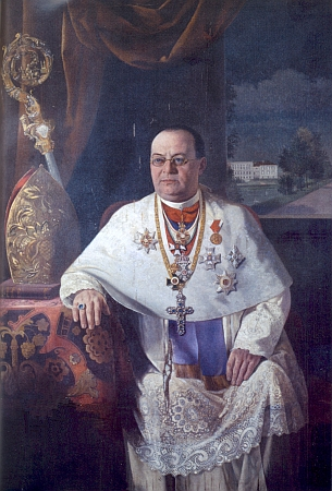 Gilbert Helmer OPraem (1864 - 1944), Opat kláštera v Teplé .na portrétu malíře Antona Wallera